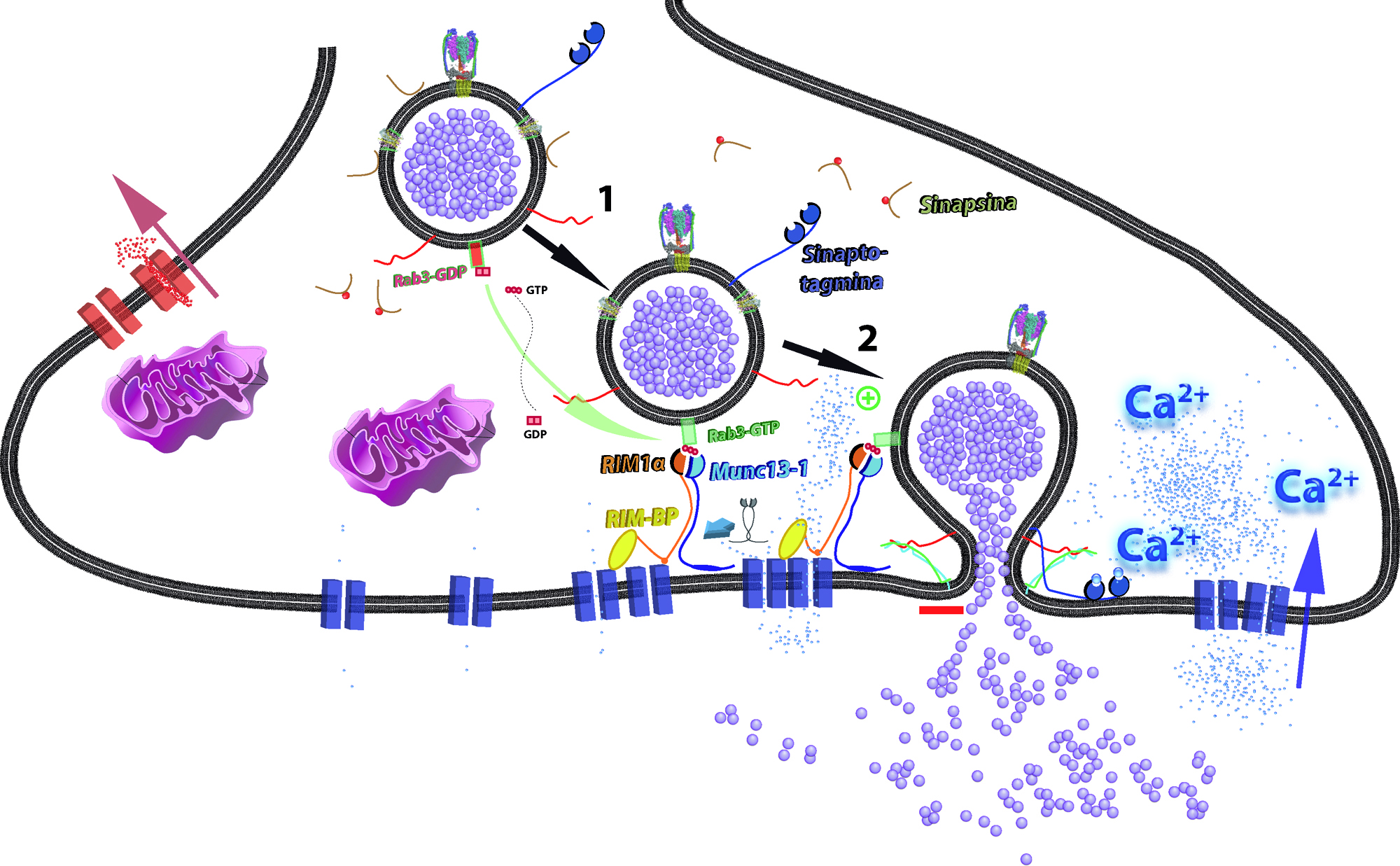 Basic model of synaptic exocytosis